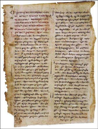 ტბეთის მრავალთავი